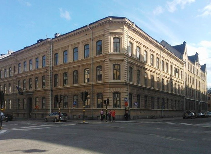 Hedvig Eleonora skola, korsningen Linnégatan, 2013.